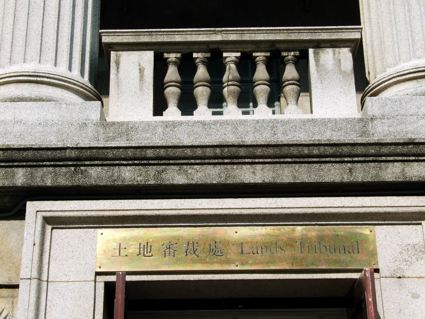 南九龍裁判法院現時用作土地審裁處